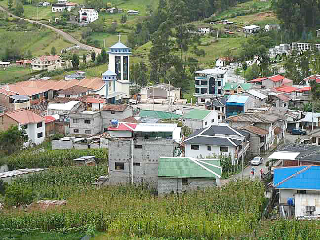 Parroquia Checa del cantón Cuenca